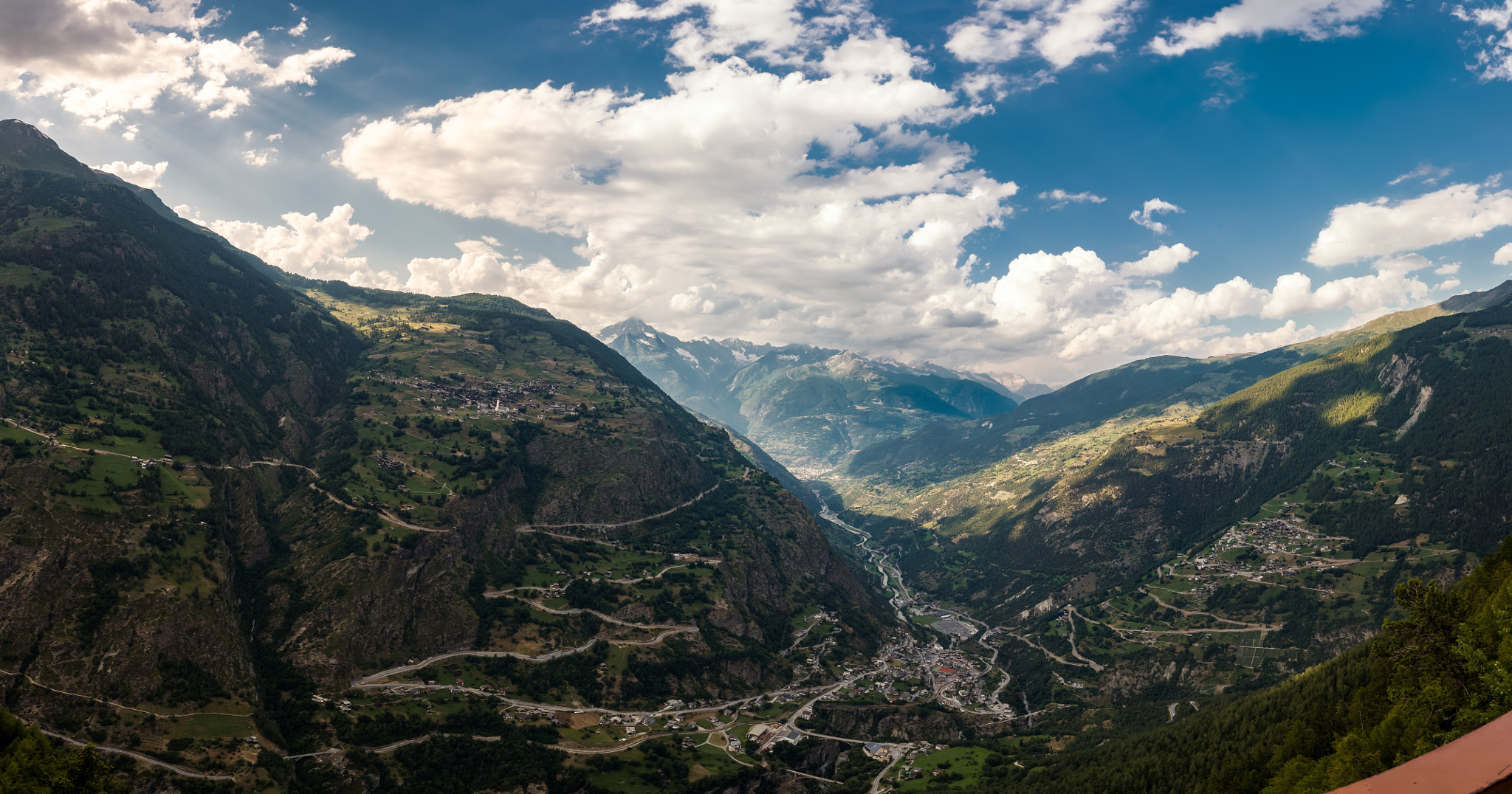 500px provided description: stalden, staldenried & t?rbel, in a hdr panorama. valais - switzerland [#sky ,#hdr ,#sunset ,#switzerland ,#mountains ,#street ,#river ,#blue ,#clouds ,#tree ,#summer ,#white ,#green ,#panorama ,#forrest ,#village ,#pano ,#valley ,#sunny ,#valais ,#gigapixel ,#giga ,#t?rbel ,#staldenried ,#stalden]